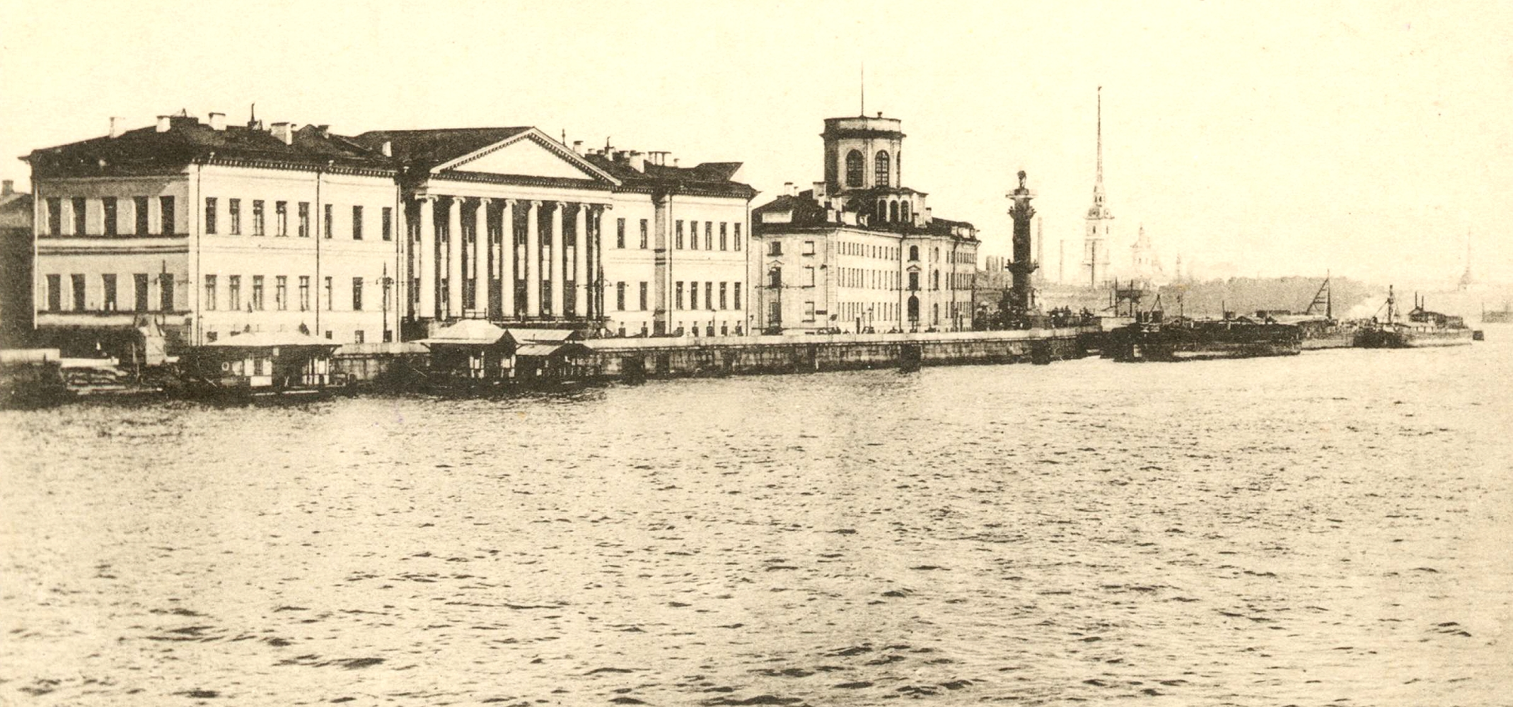 Императорская академия наук, фото А. Павловича.